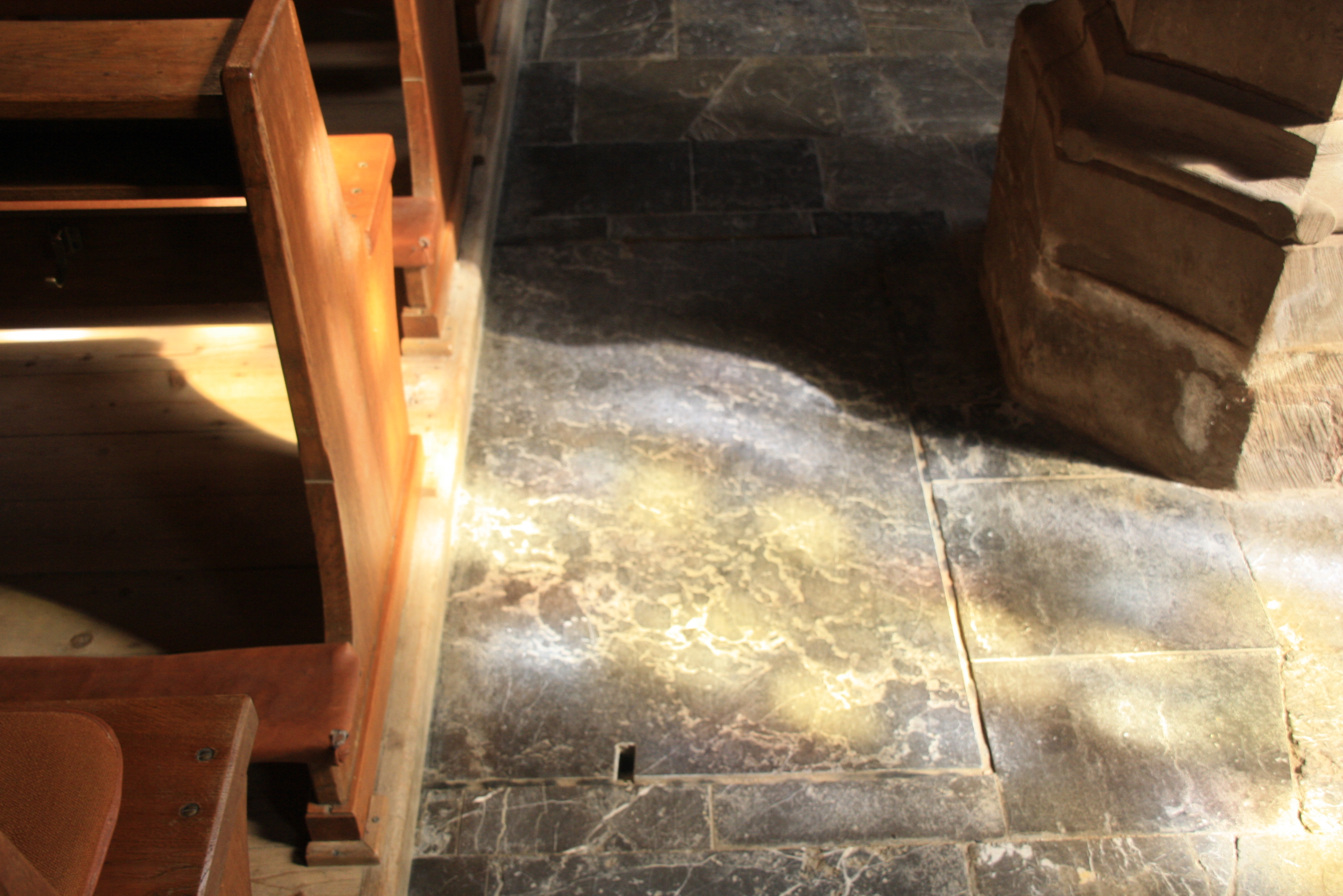 Die Kirche St. Viktor in Hochkirchen